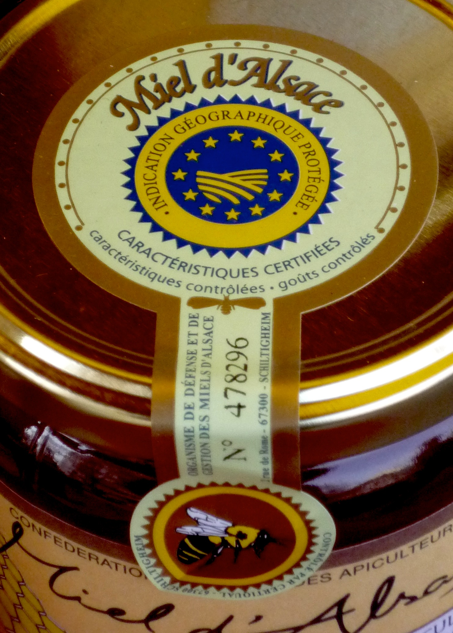 Etiquette Miel d’Alsace IGP